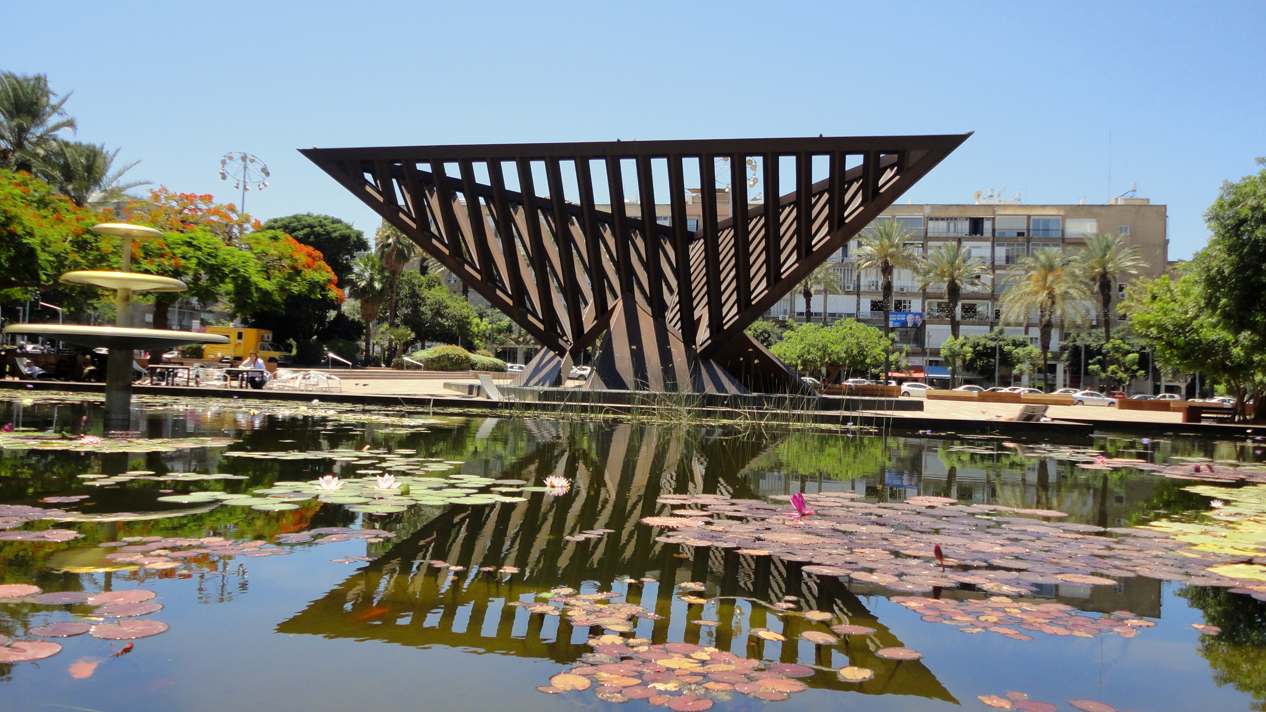 Sculpture